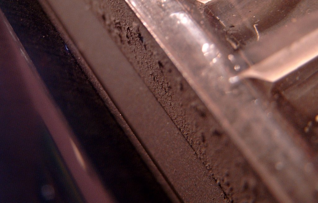 Einwegentwicklereinheit